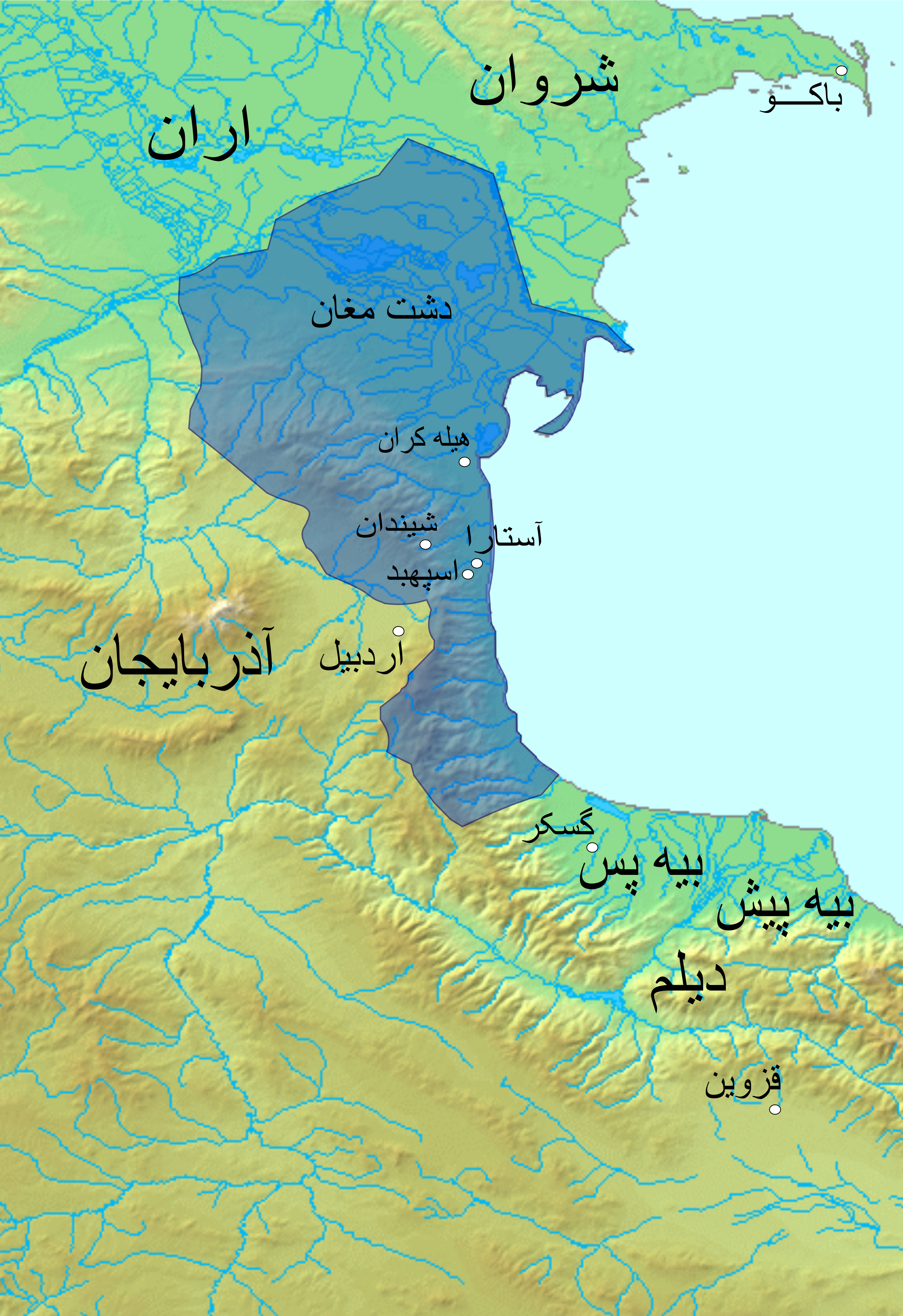 نقشه محدوده بیشینه اسپهبدان تالش-مغان